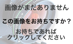 画像募集メッセージ